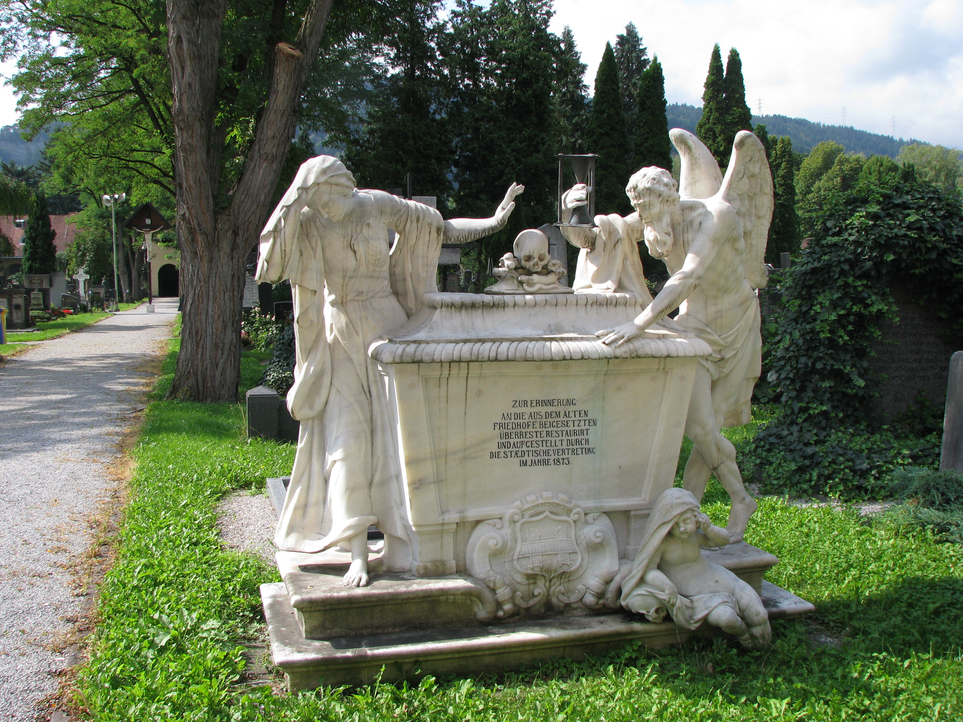 Saturndenkmal am Innsbrucker Westfriedhof